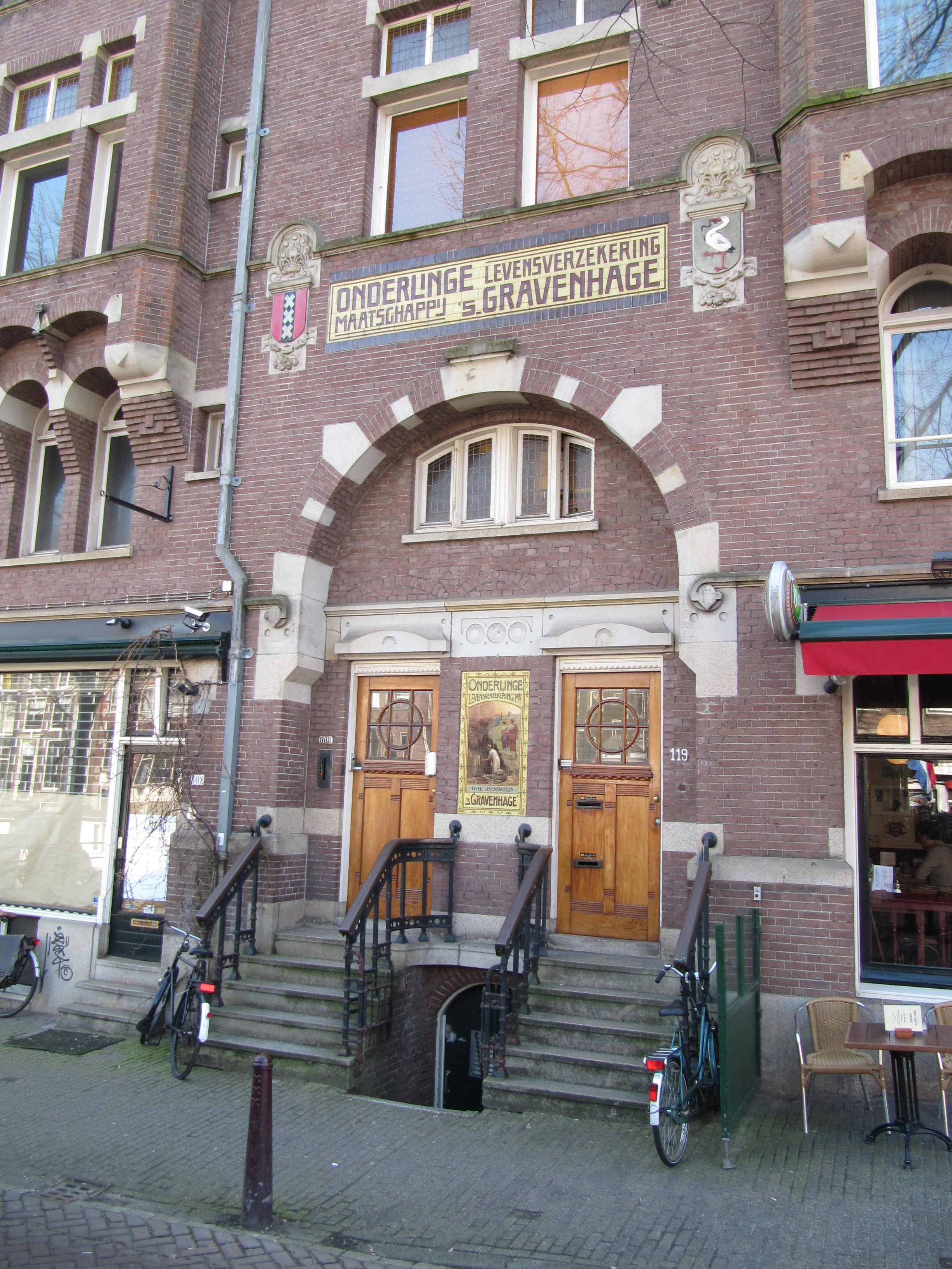 RM518367 Prinsengracht 808 (detail).jpg